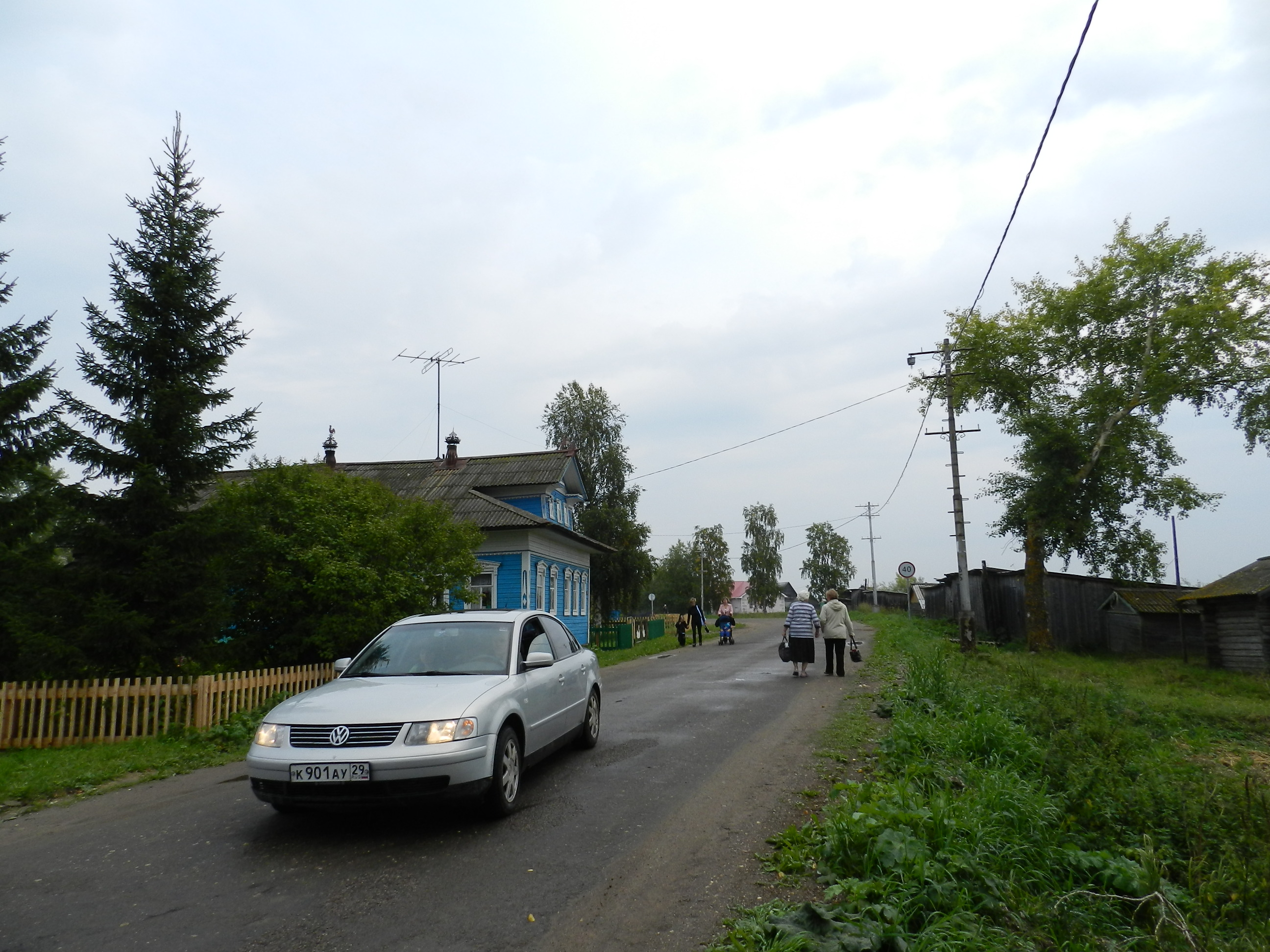 Central street in Lomonosovo